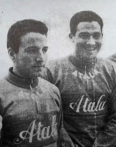 Sandro Cervellini, Vito Taccone, Giovanni Cordovani e Vincenzo Meco